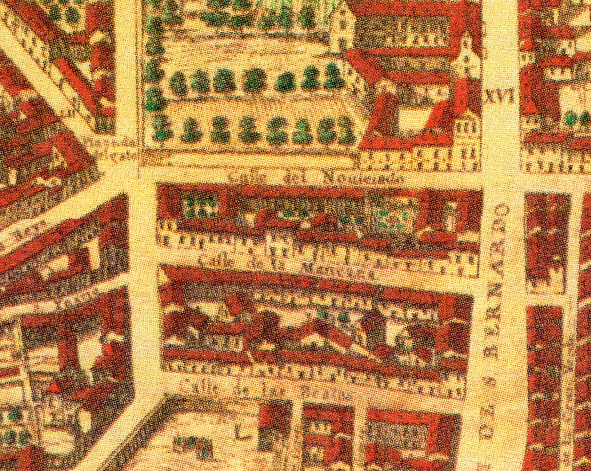 Topografía de la Villa de Madrid descrita por Don Pedro Texeira en 1656, en la cual se demuestran todas las calles al largo y ancho de cada una de ellas, las rinconadas y lo que tuercen las Plazas, fuentes, jardines y huertas con la disposición que tienen las parroquias, Monasterios y Hospitales están señalados sus nombres con letras y números que se hallaran en la tabla y los demás edificios, torres y delanteras de las casas de la parte que mira al Mediodía están sacadas al natural que se podrán tocar las puertas y ventanas de cada una de ellas.